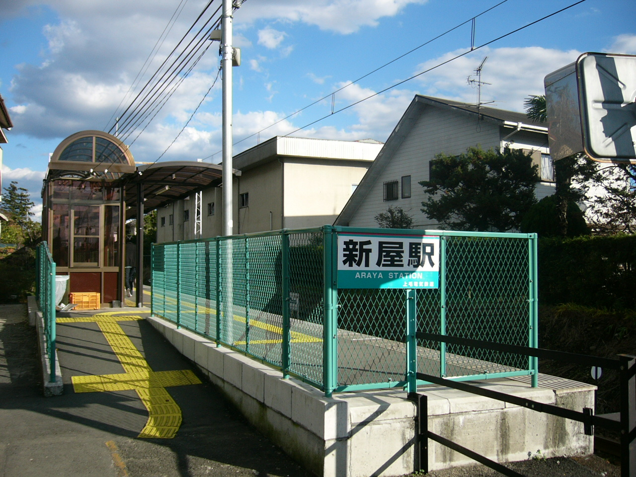 Araya Station